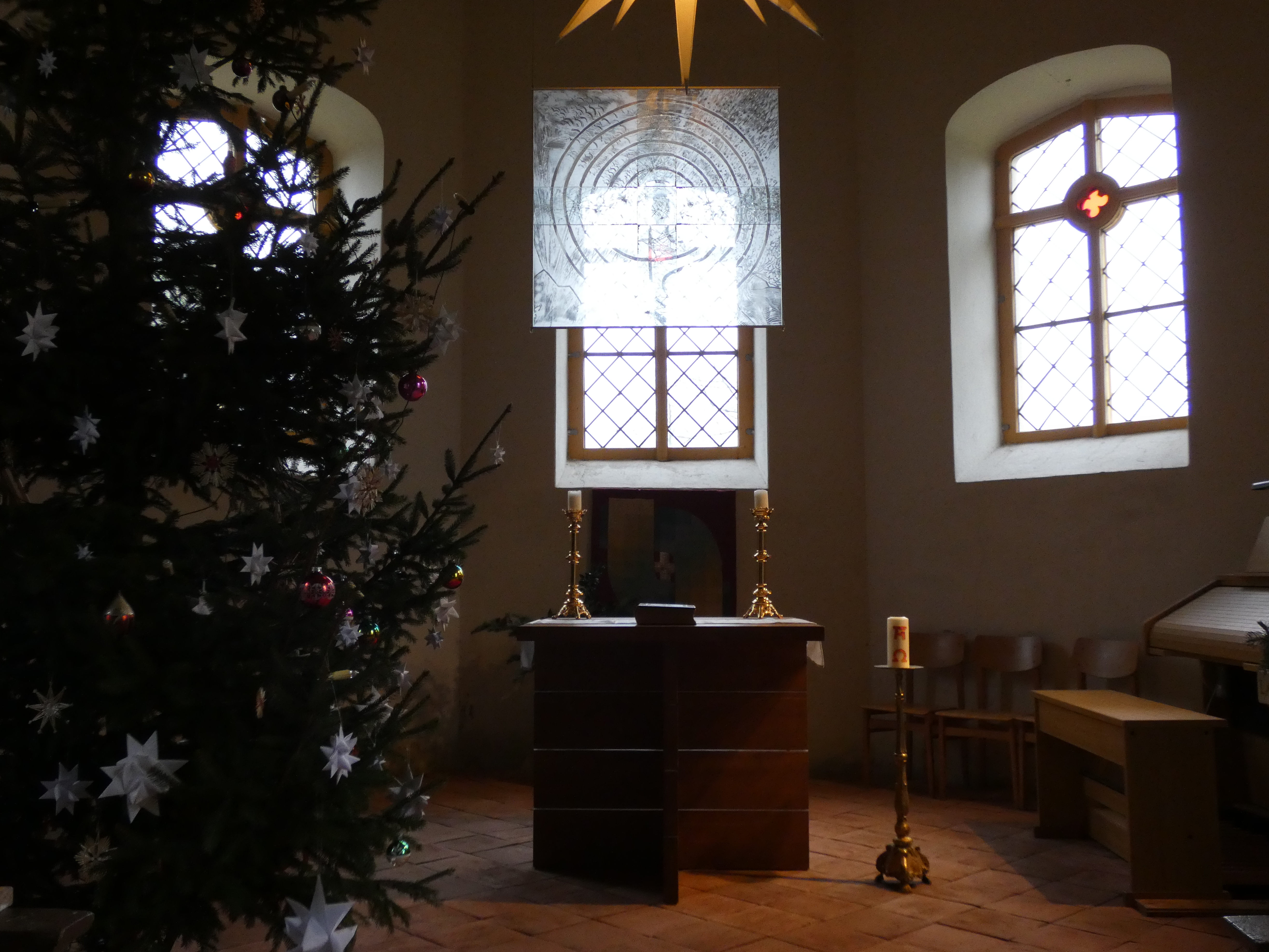 Chorraum Kirche Lünow mit Altar, gläsernem Altarbild Kreuz und Labyrinth der Künstlerin Annelie Grund und elektrischer Orgel in der Vorweihnachtszeit